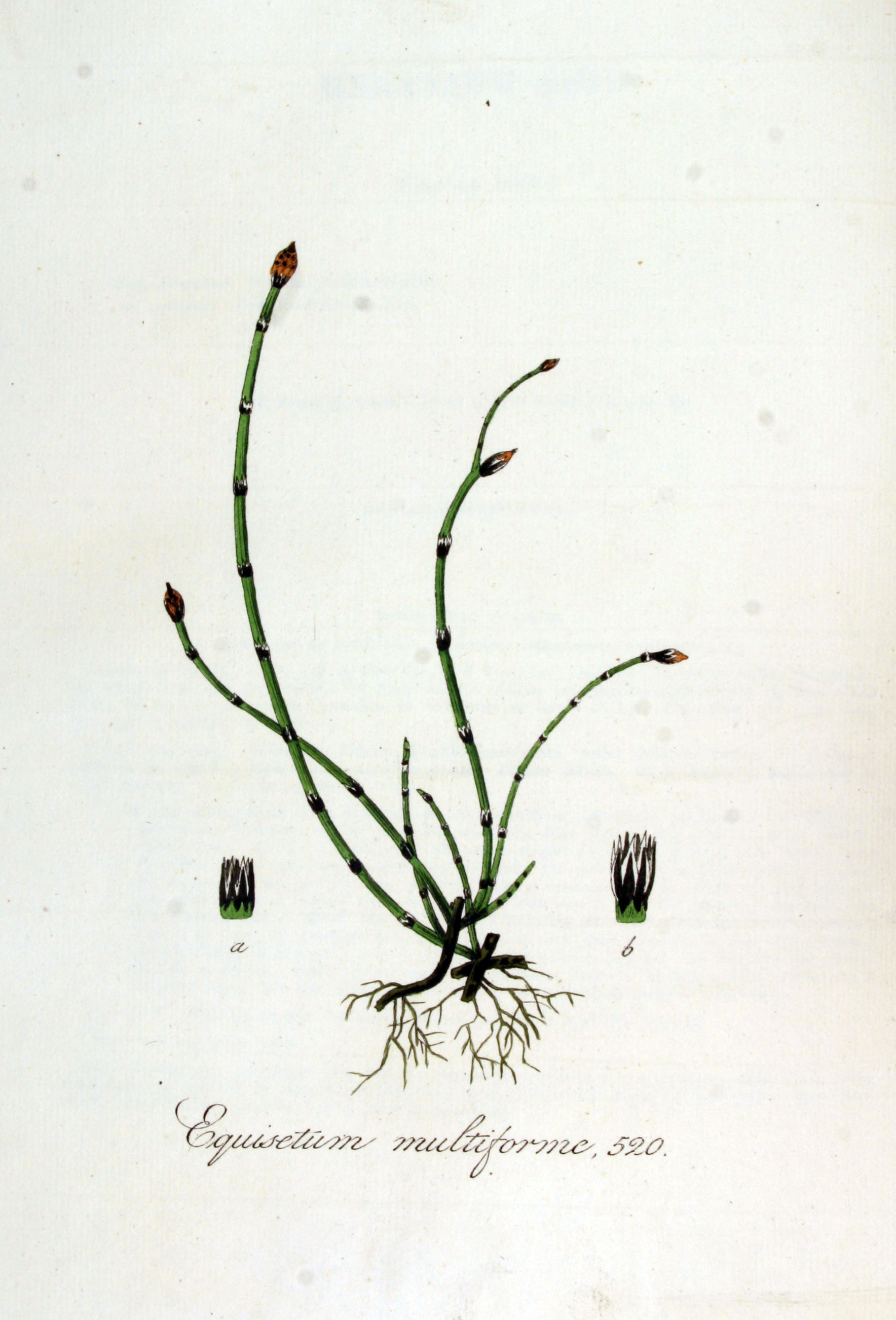 Equisetum ramosissimum Desf. (Syn. Equisetum multiforme Vauch.)